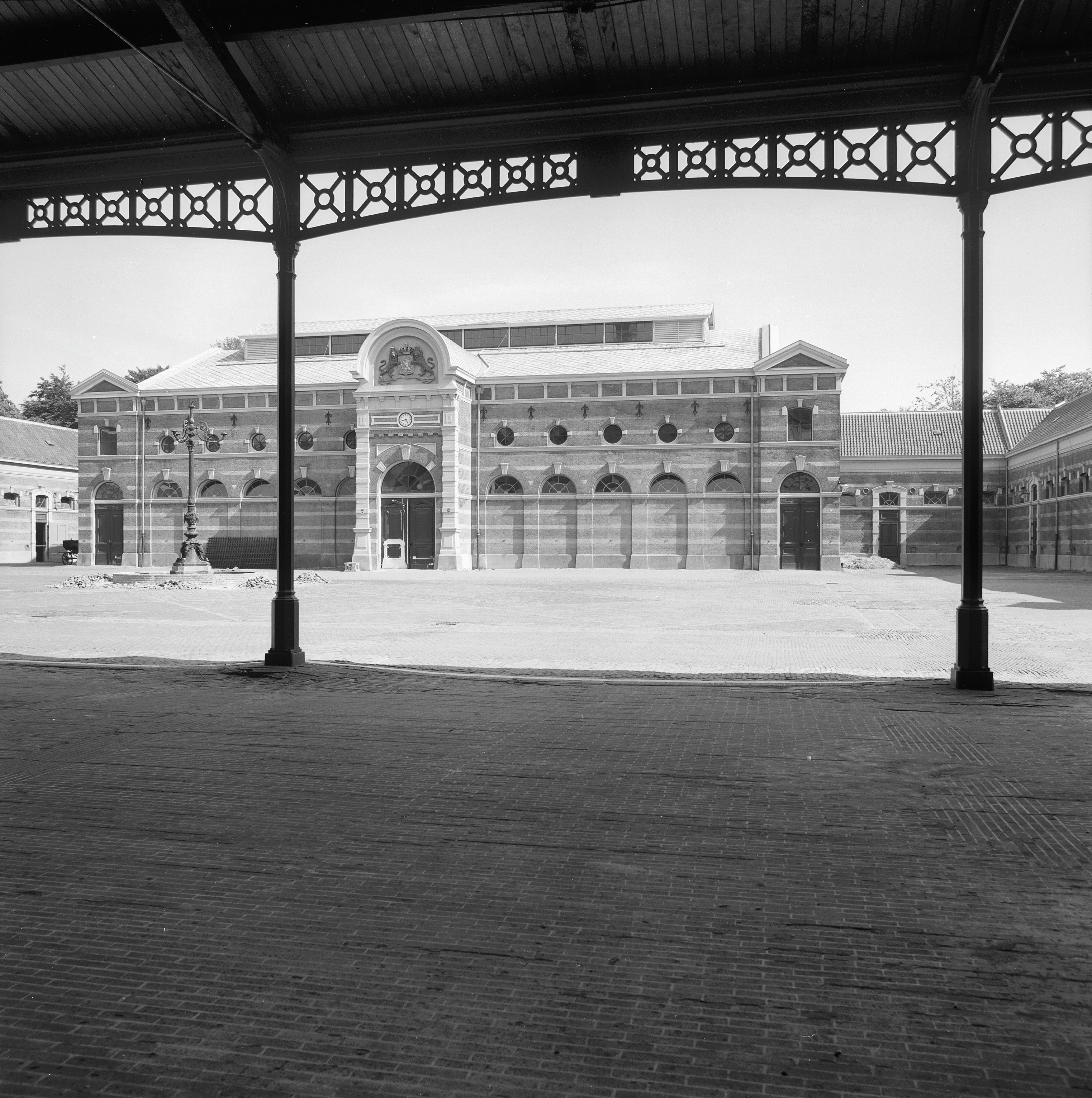 Kon. Stallen: gevel binnenplaats